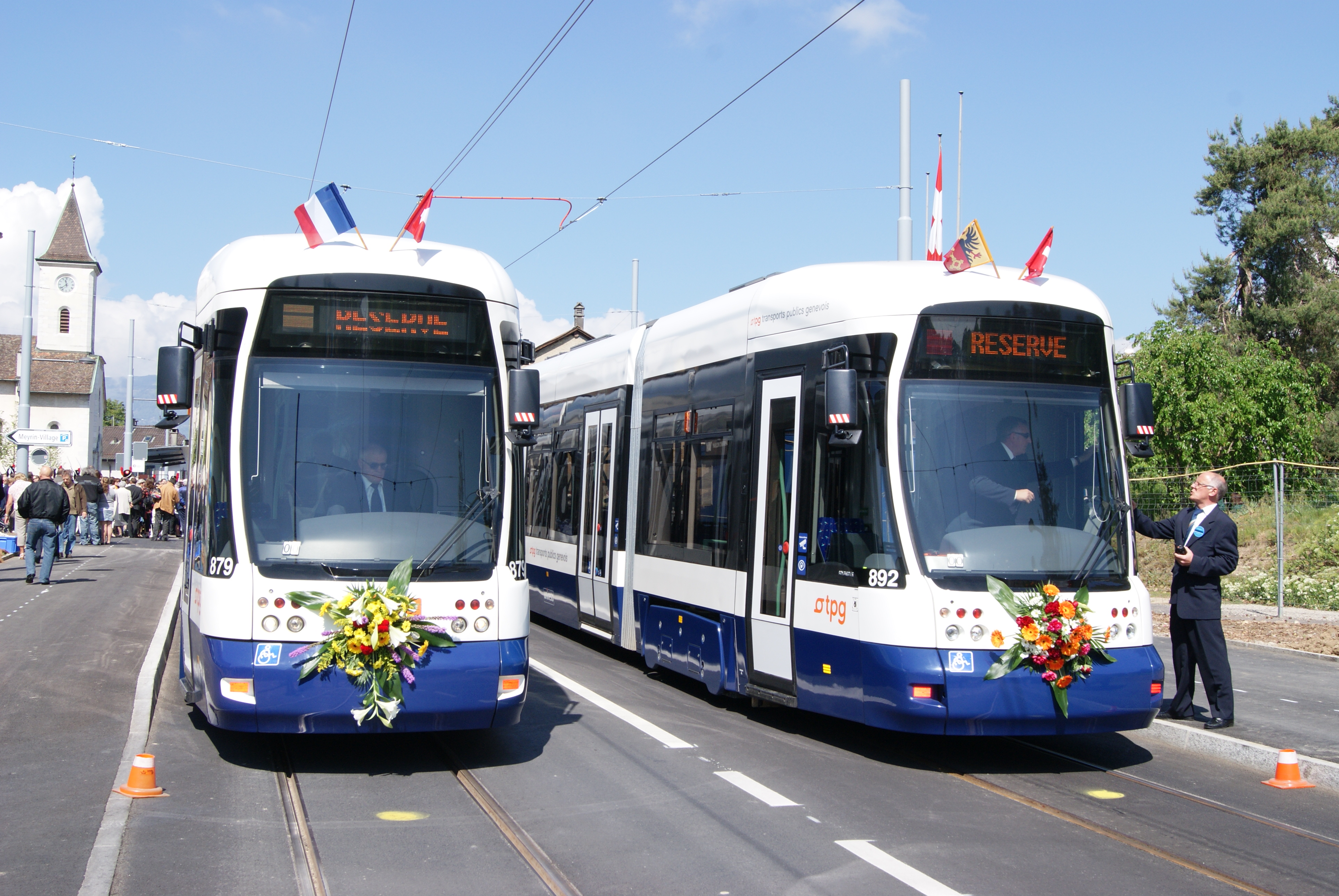 Photo: Trams aux Fils. Samedi 30 avril 2011 a été inauguré le prolongement de la ligne 18, Bois-du-Lan Cern, soit 2.5 kilomètres. De ce fait, la ligne de bus 56 a été supprimée depuis le 02-04-2011.